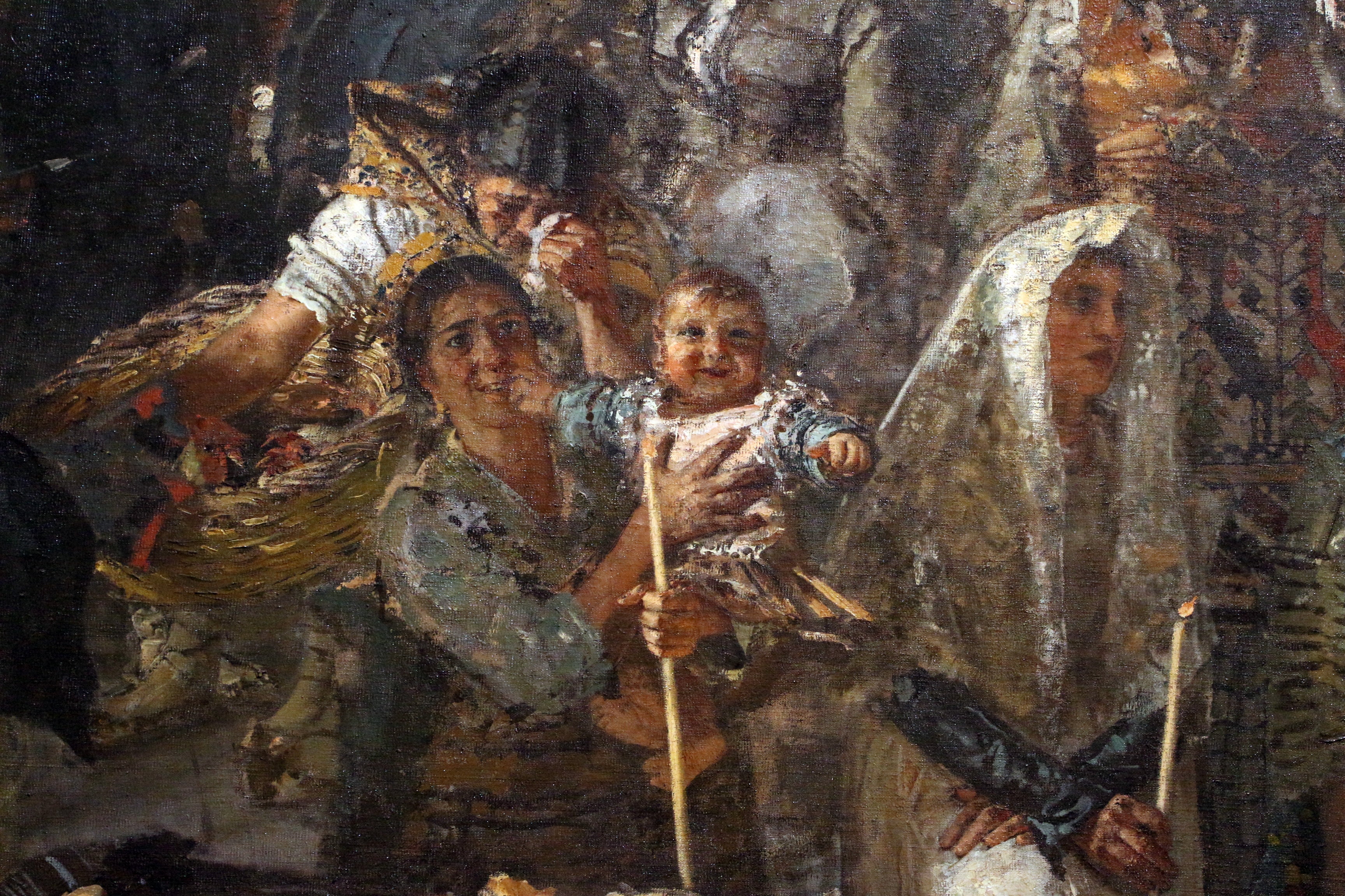 detail